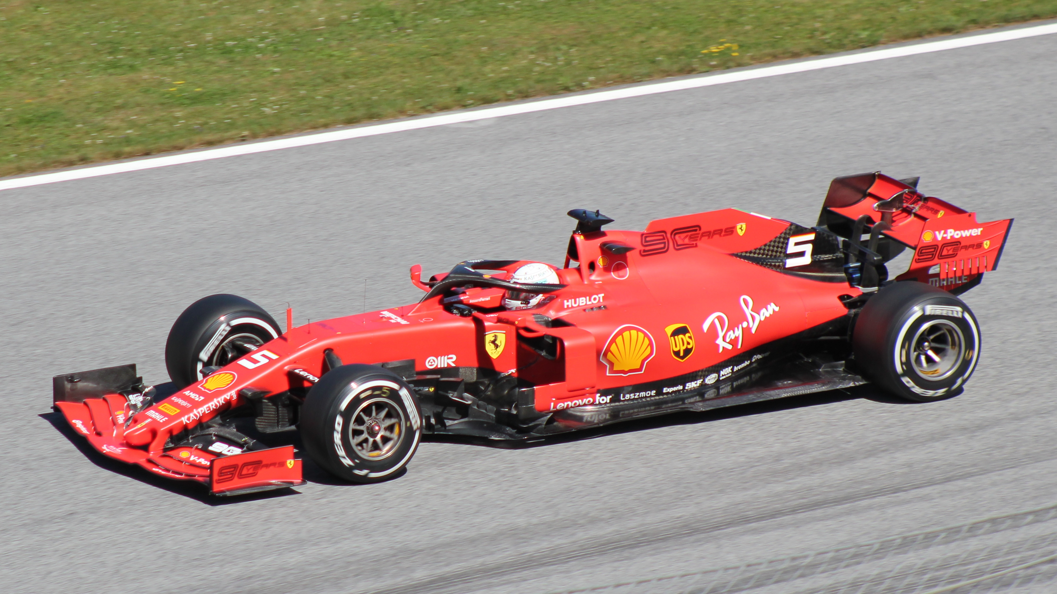 Vettel beim Rennwochenende in Österreich 2019